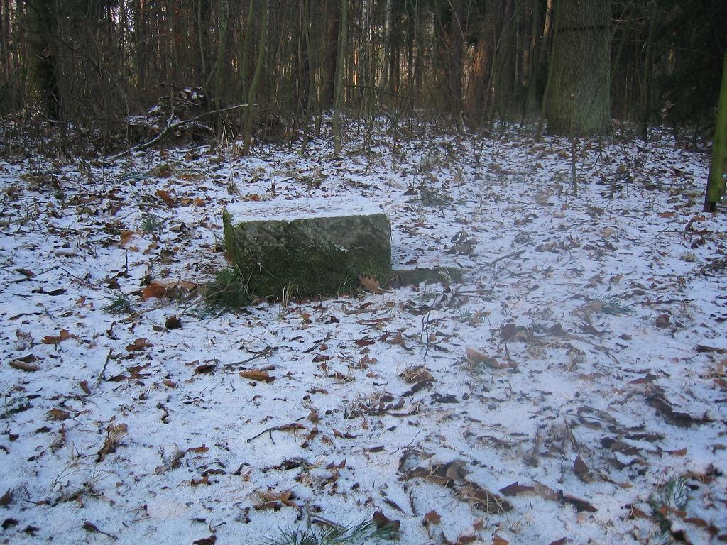 Aufsteighilfe: Damentrittstein im Langebrücker Saugarten, Dresdner Heide, Dresden, Deutschland.